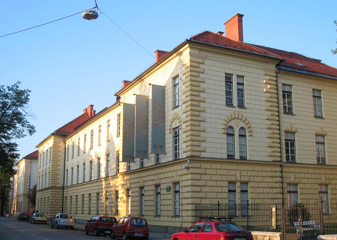 "Belgian" army building, Ljubljana. photo:Ziga 15:56, 8 May 2006 (UTC)